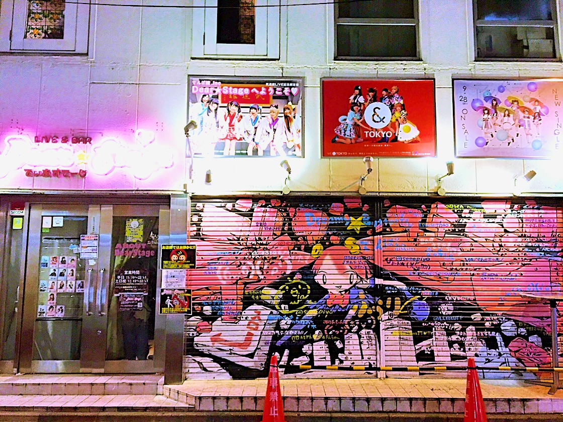 秋葉原ディアステージ店舗正面より